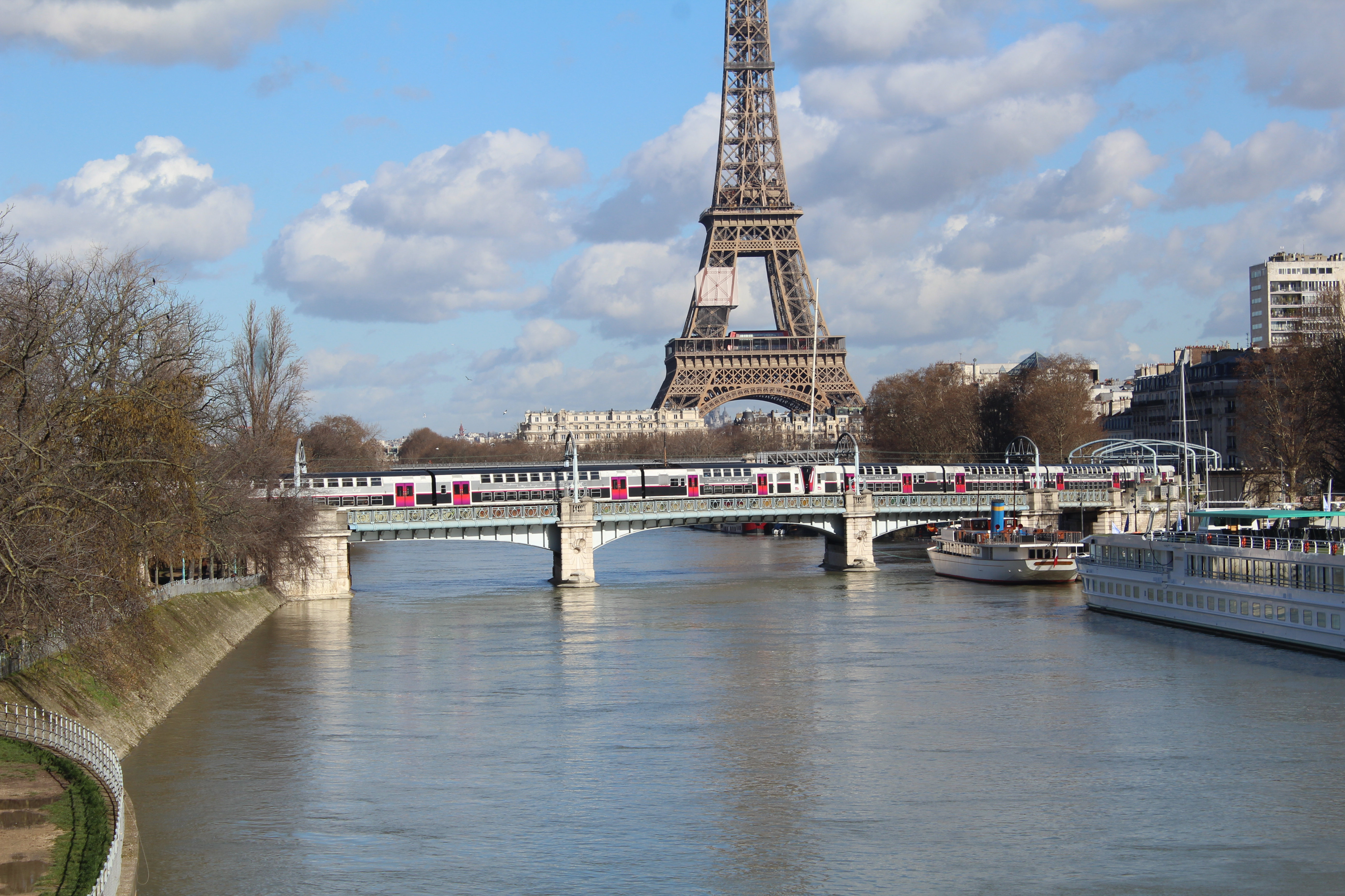 Pont Rouelle, Paris.